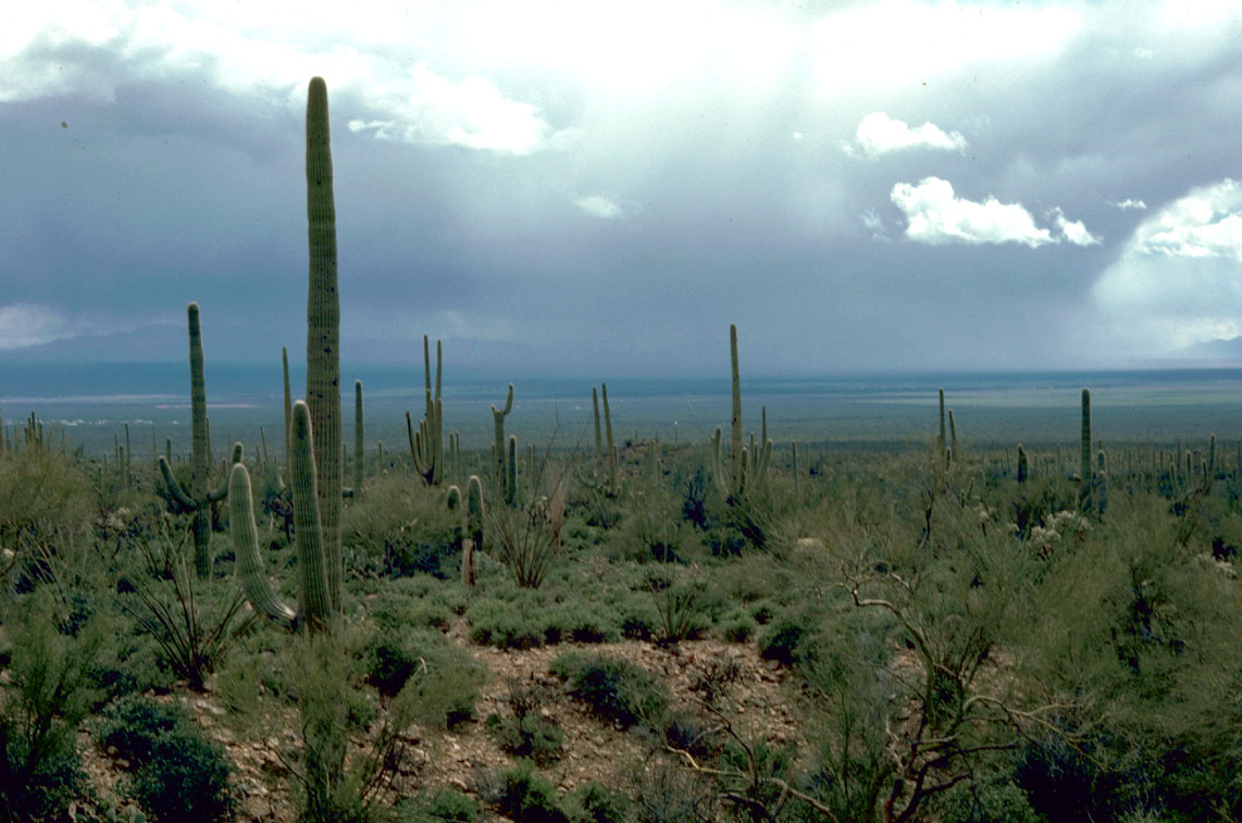 Carnegiea gigantea, Saguaro Cactus in Sonoran desert, Arizona USA